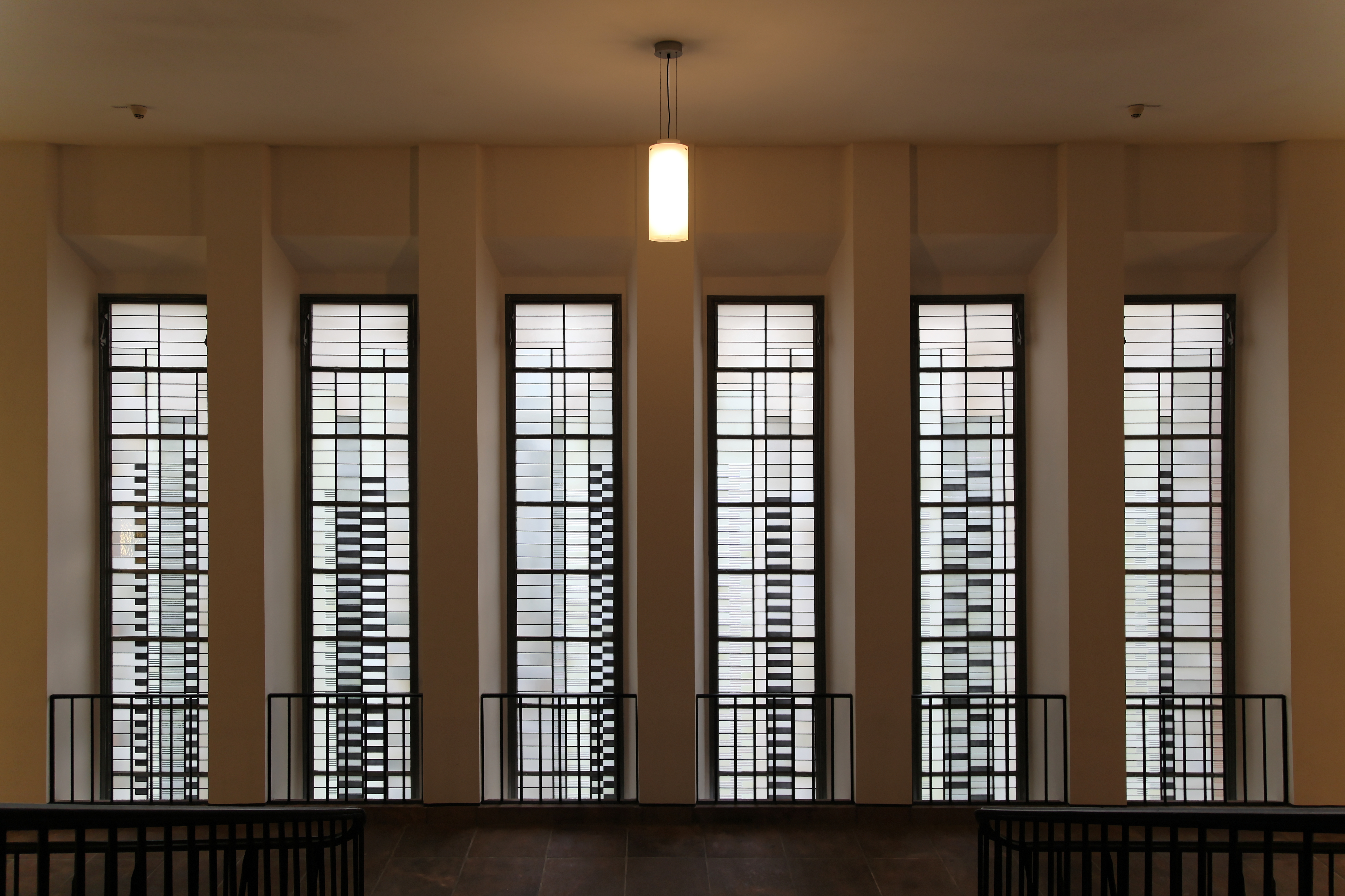 Josef-Albers-Fenster im Grassimuseum in Leipzig